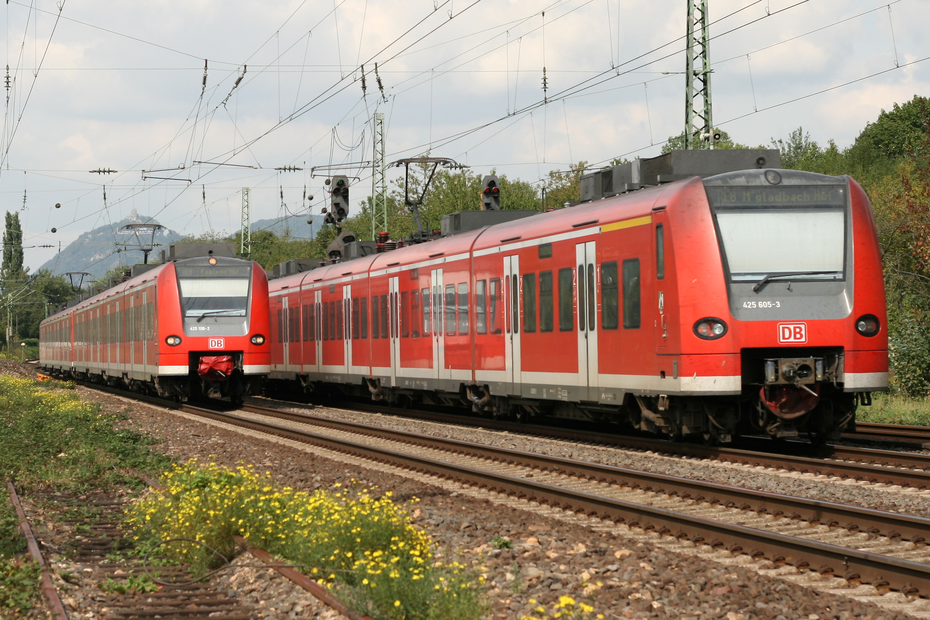 Zwei Regionalexpresszüge der Baureihe 425 treffen sich in Unkel